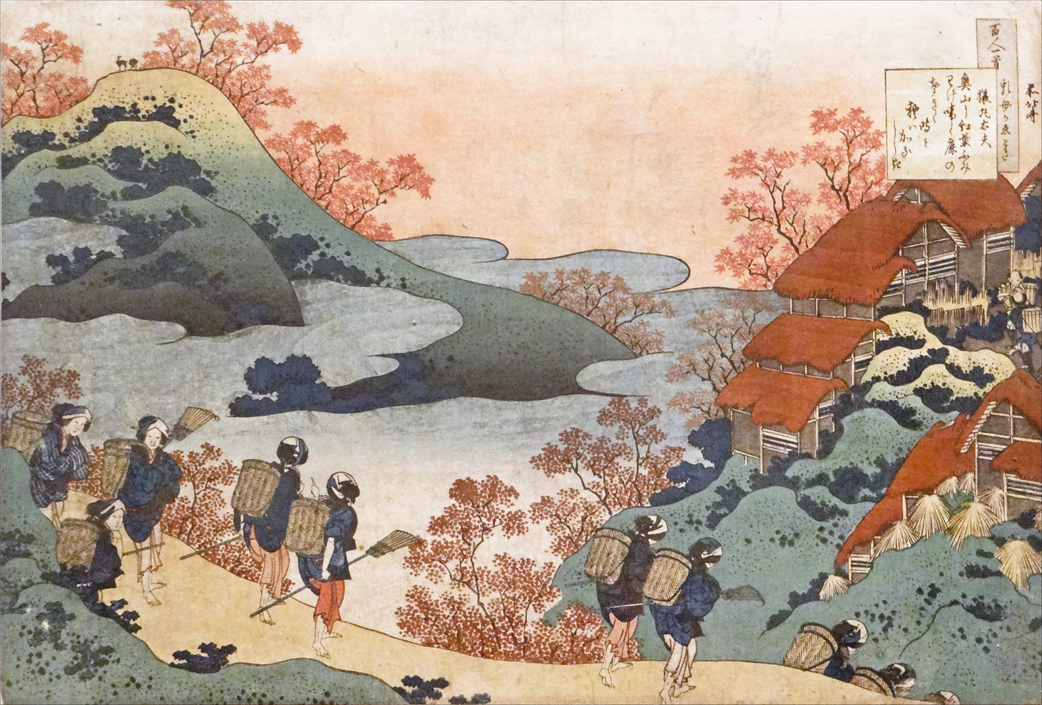 Les Cent poèmes de cent poètes expliqués par la nourrice Hyakunin isshu uba ga etoki Sarumaru Daiyû Oeuvre de Katsushika Hokusai (1760-1849) 1835 Impression polychrome (Nishiki-e), format ôban, Editeur: Iseya Sanjirô Cachet de censure : kiwame Signature: Zen Hokusai Manji, Legs Isaac de Camondo, 1911 - EO 3289 Musée national des arts asiatiques, musée Guimet